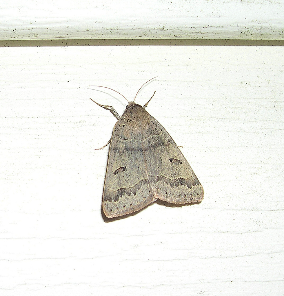 March 22, 2011